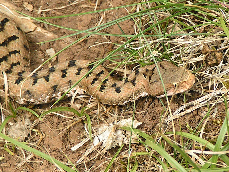 Vipera aspis - Viperidae